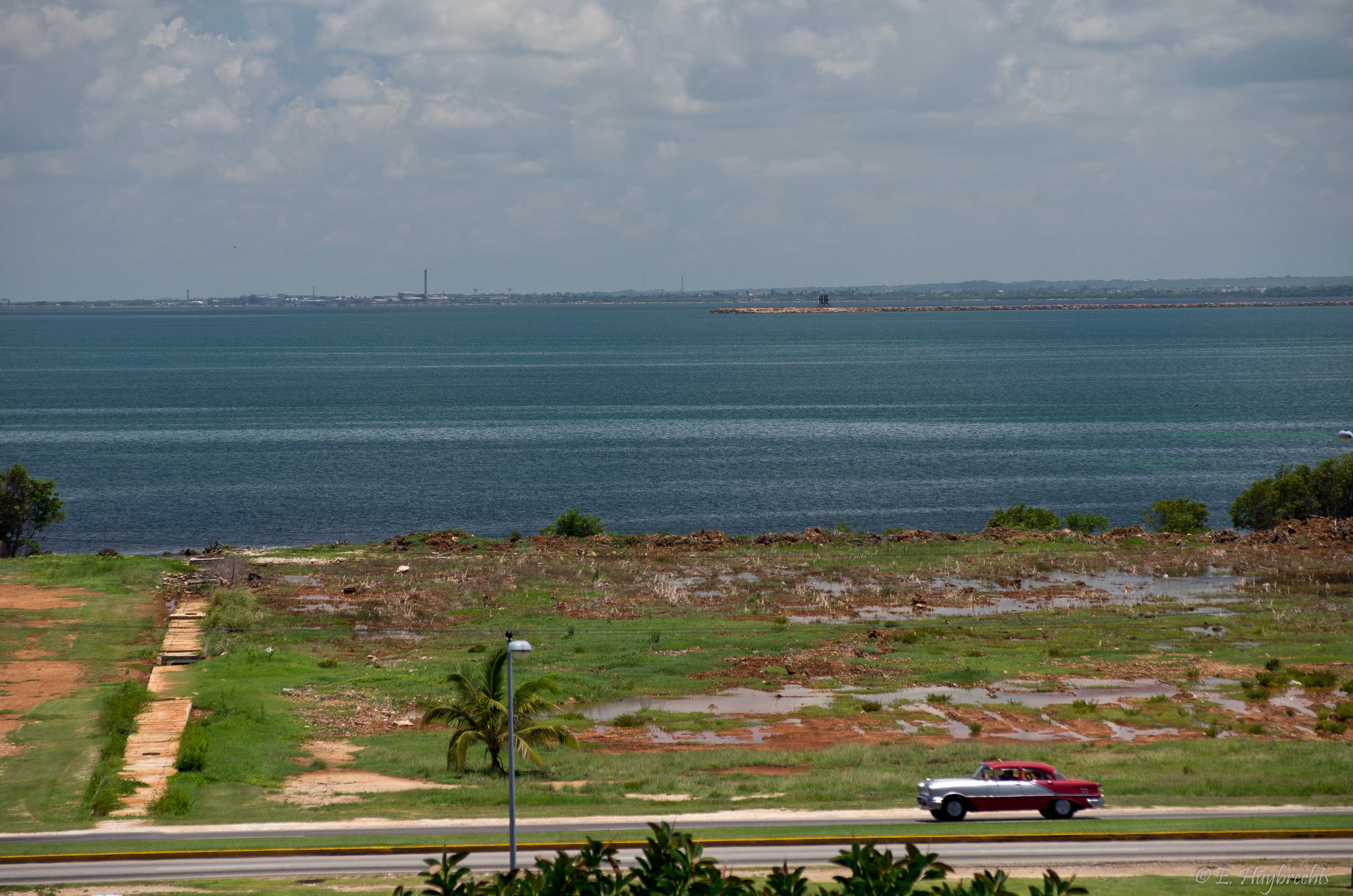 Bay of Cárdenas, Varadero